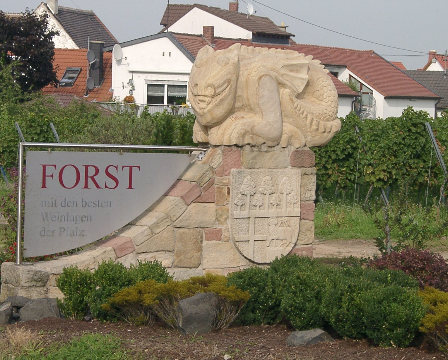 Zu sehen ist eine Skulptur des "Forster Ungeheuers", Wahrzeichen von Forsts berühmter Weinlage "Ungeheuer". Die Skulptur steht am südlichen Ortsausgang von Forst.